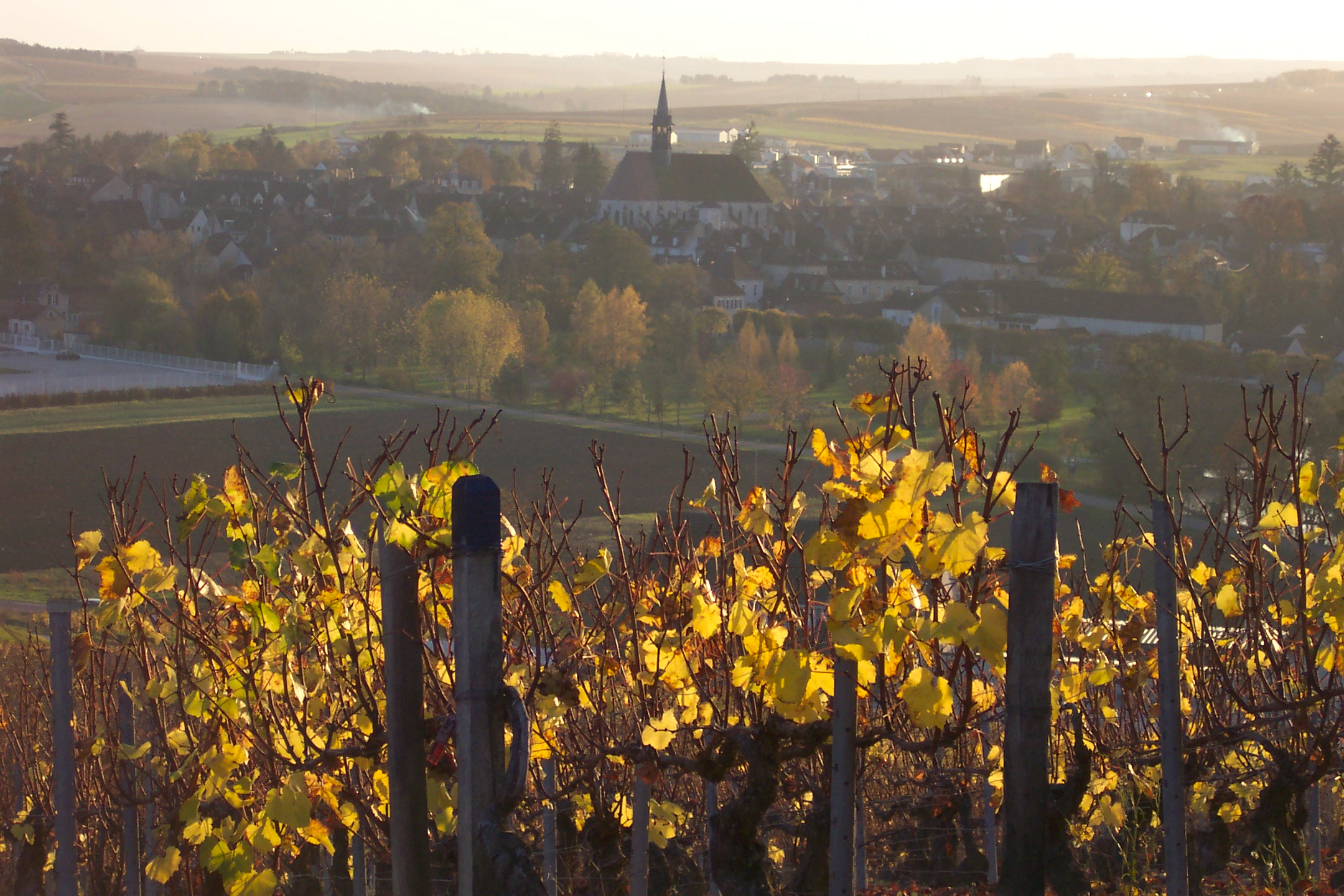 vignoble chablis